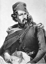 Ritratto del Generale pontificio Christophe de Lamoricière.